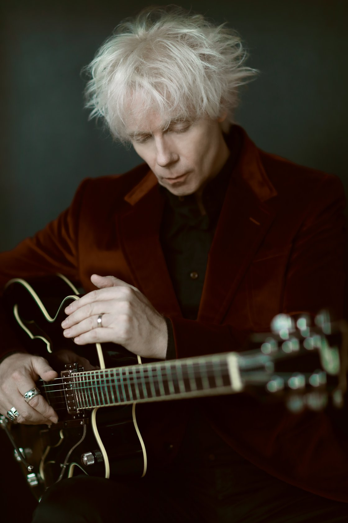 Michael Sele Mastermind of The Beauty Of Gemina